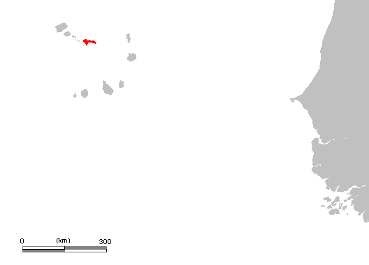 CV Sao Nicolau.PNG (Cape Verde)